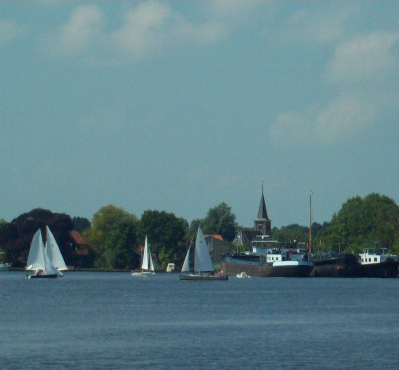 Eernewoude